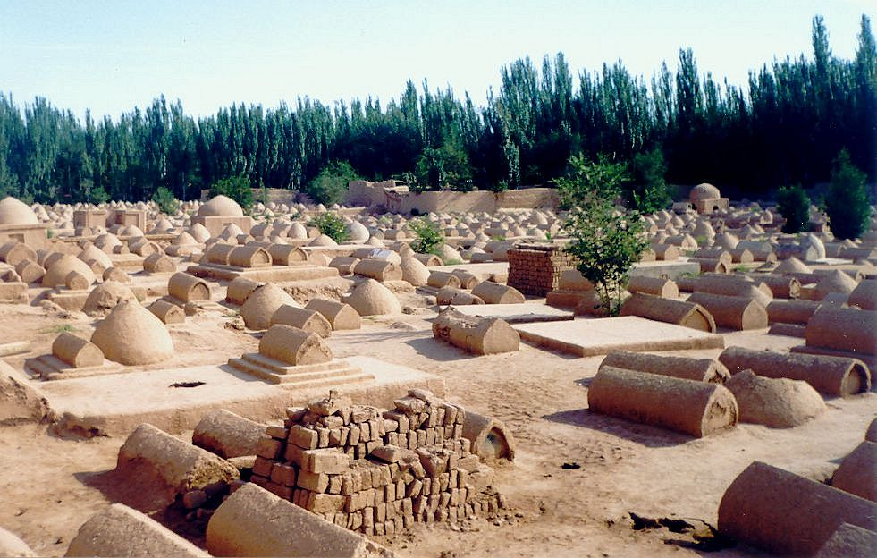 Cmentarz muzłumański w Kaszgarze